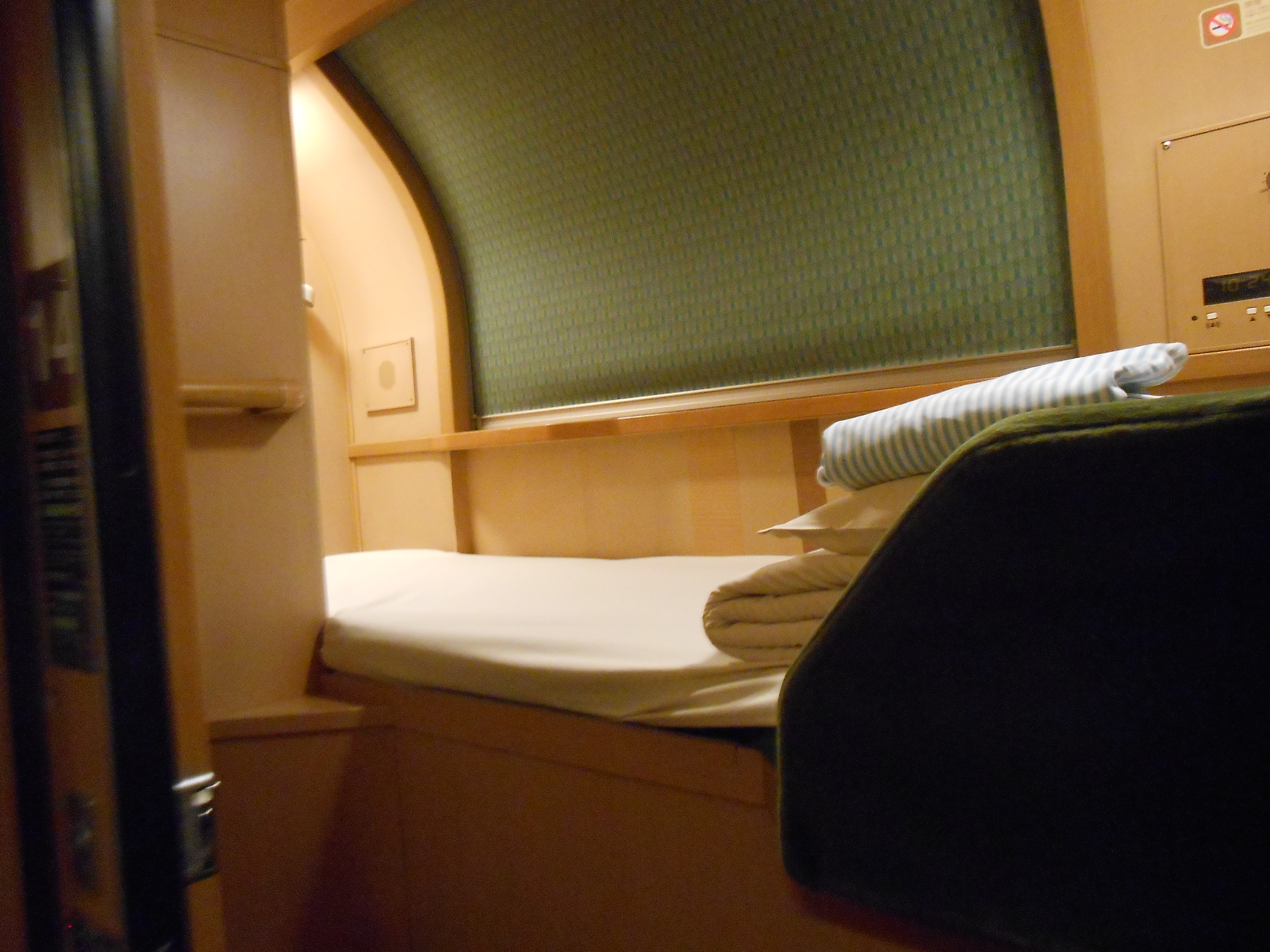 サンライズ ソロ上段